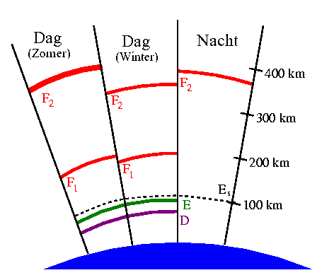 Vertaling door Danielm van afbeelding op Duitse Wikipedia gemaakt door AndreasS.